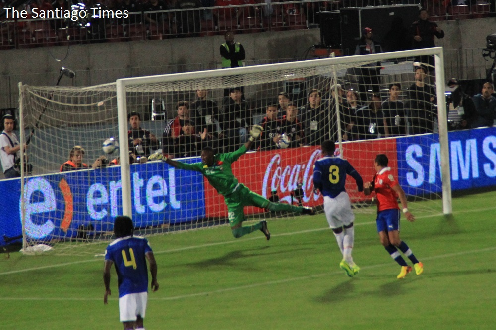 Gol de Alexis Sánchez en partido Chile-Ecuador.